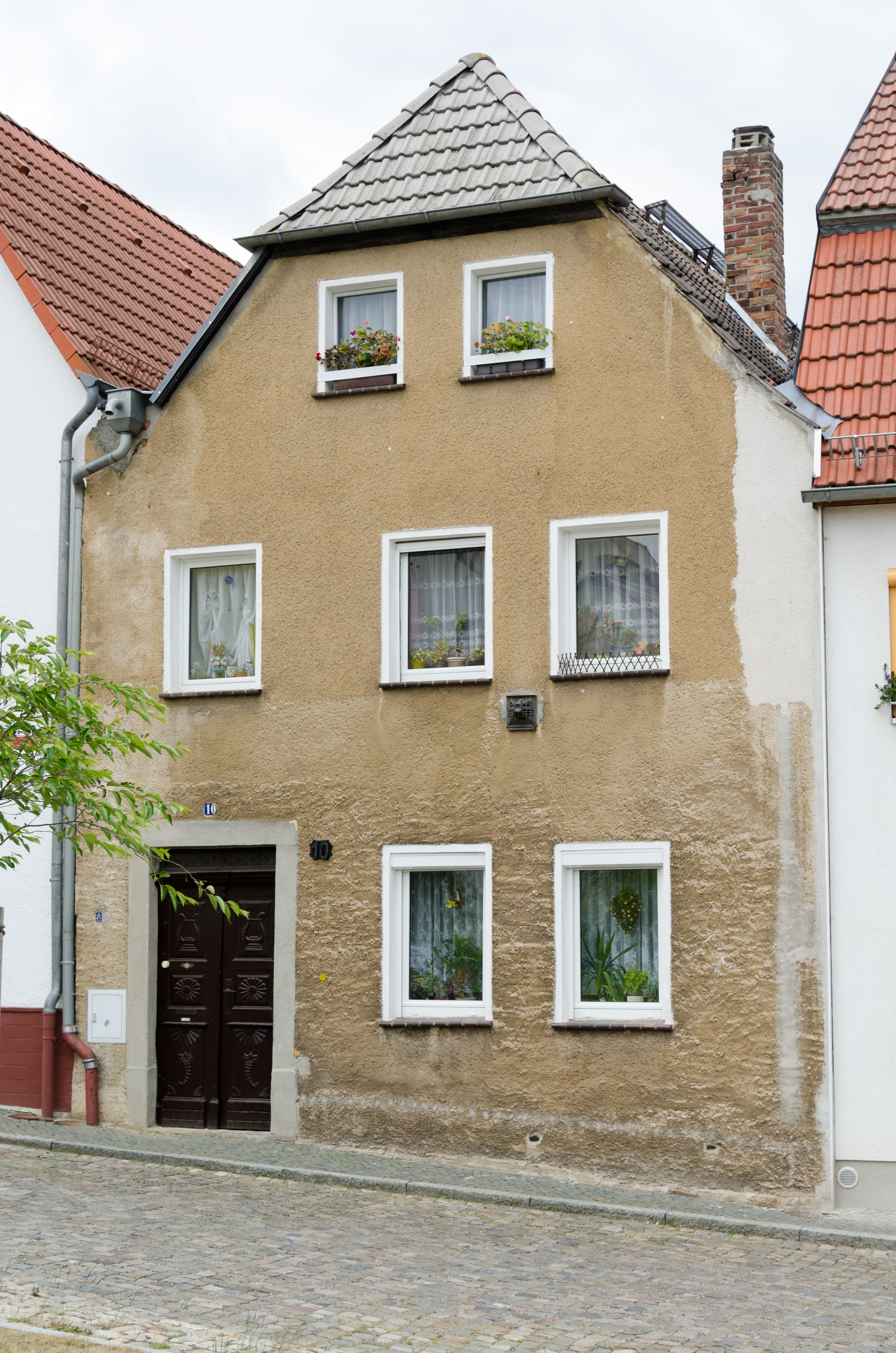 Zeitz, Ritterstraße 10